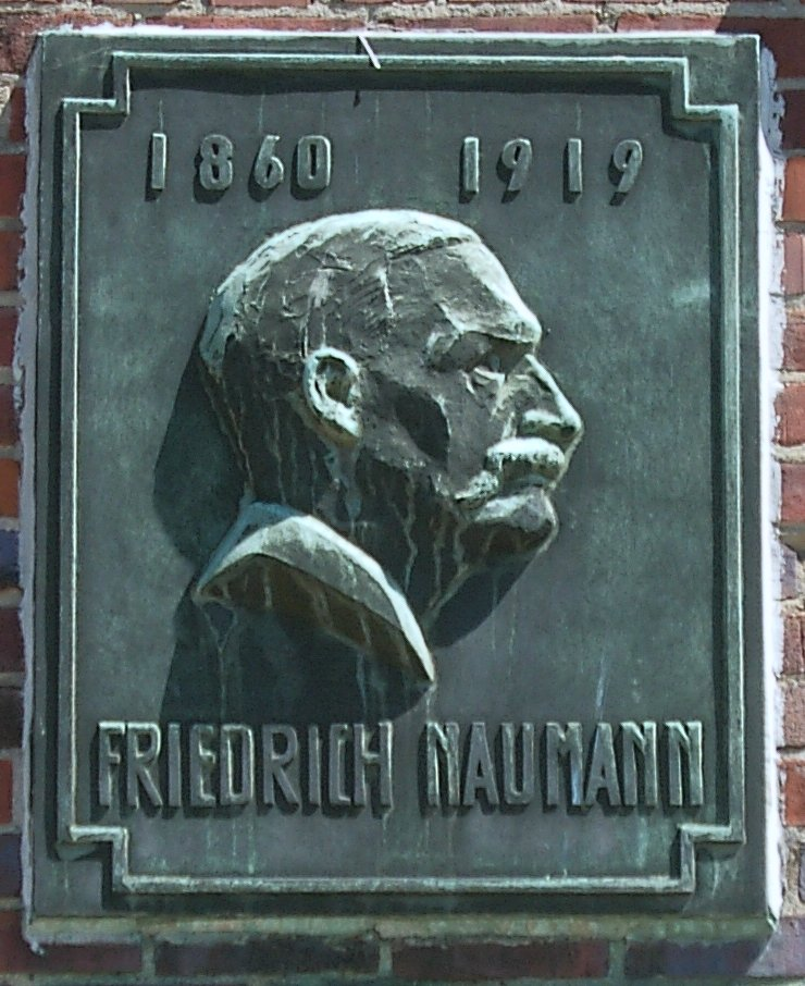 Gedenktafel für Friedrich Naumann am Naumann-Hof in der Nordschleswiger Straße in Dulsberg